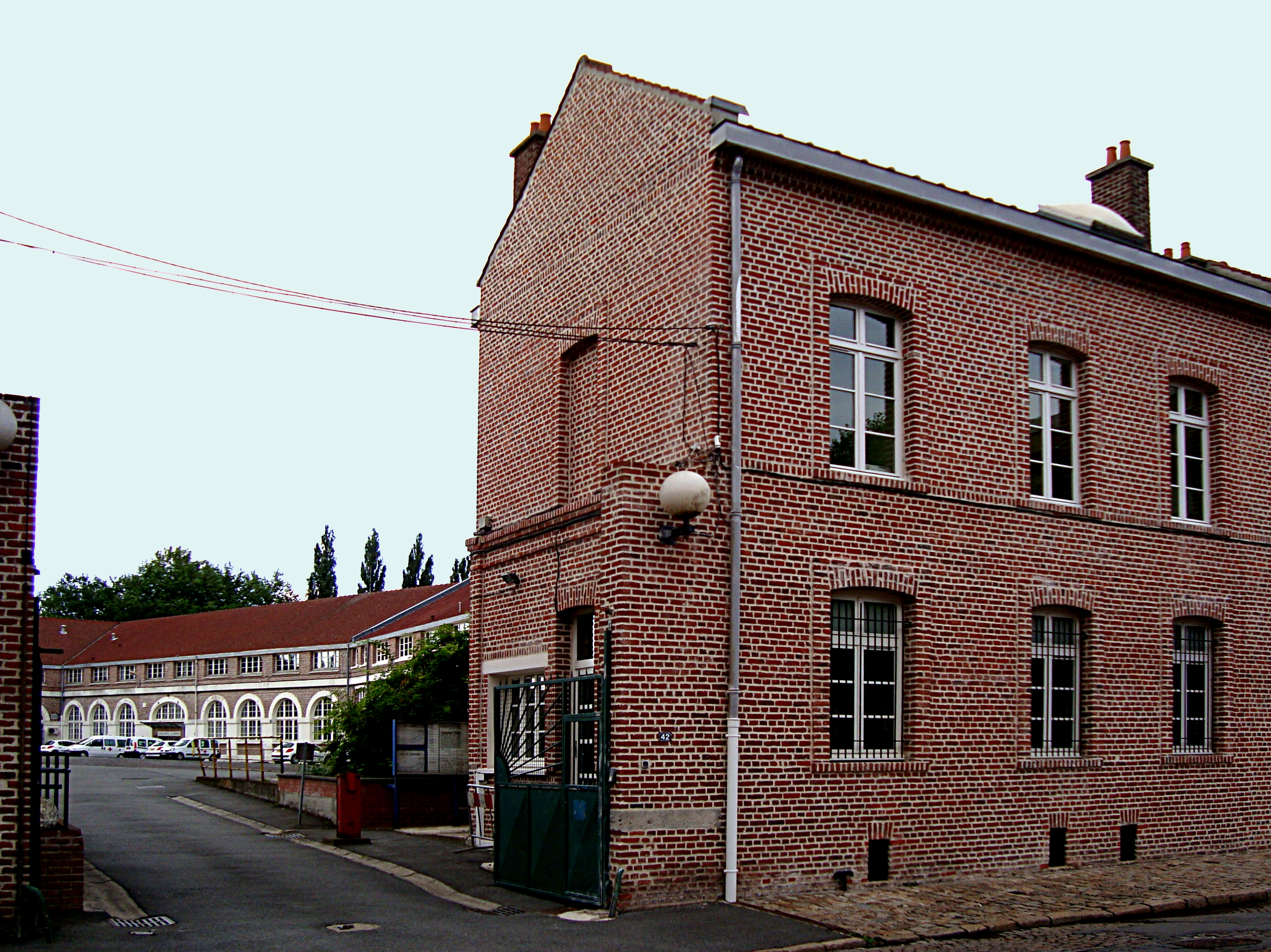 Les quartiers de la caserne Négrier à Lille (Nord).